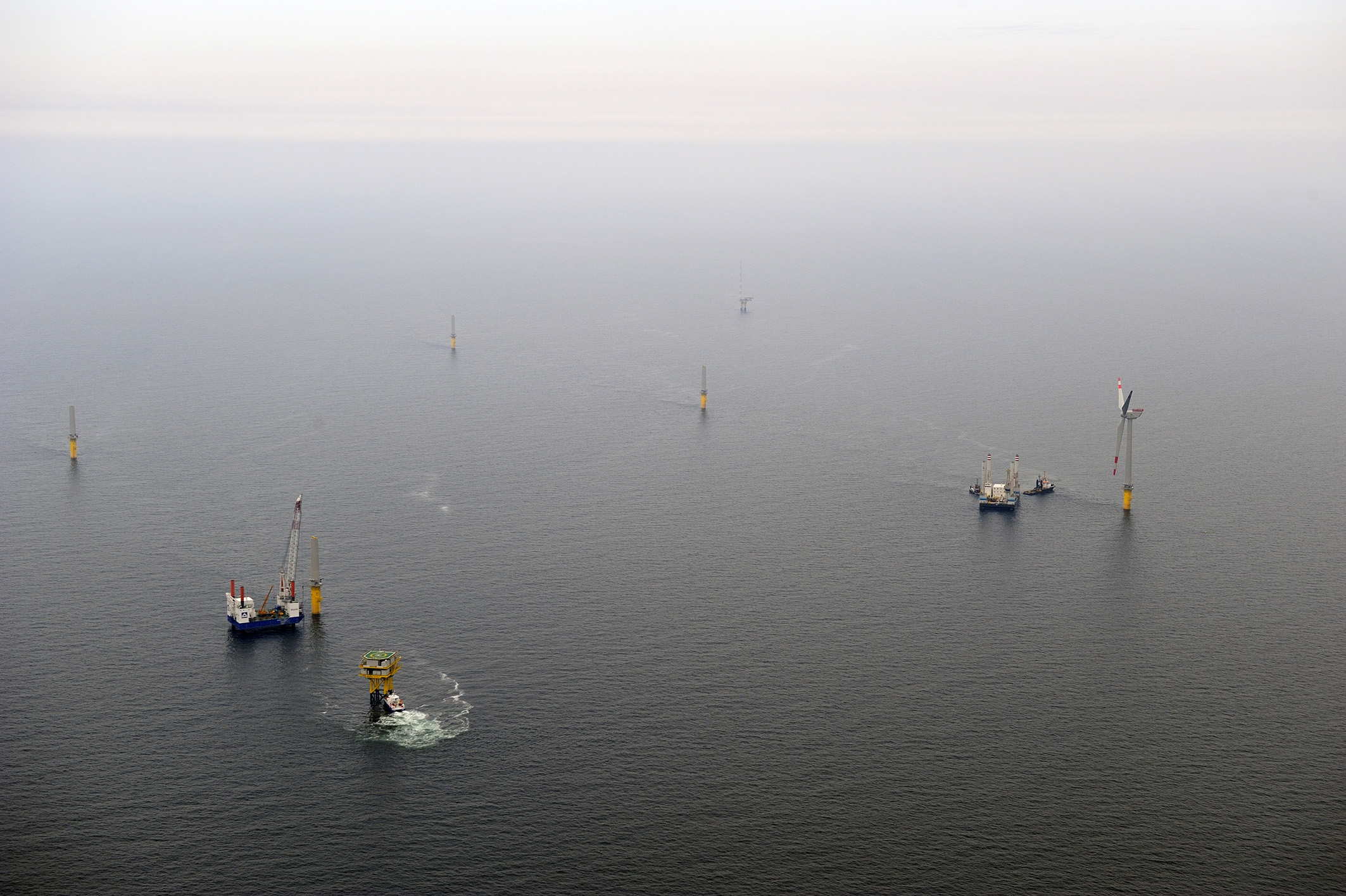 Alpha ventus, der erste Offshore-Windpark Deutschlands.